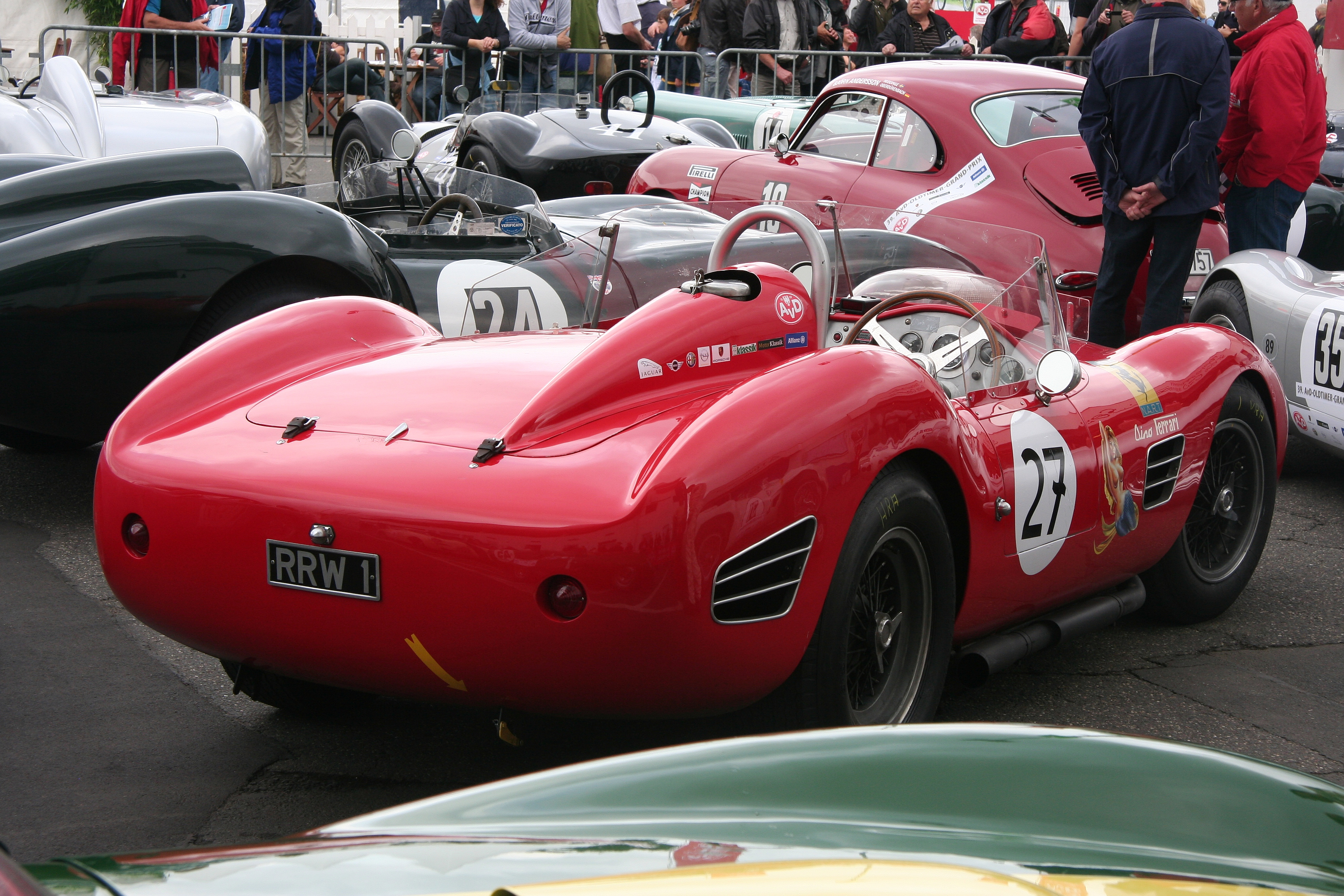 AvD Oldtimer-Grand-Prix – Parc fermé mit Ferrari Dino 196, Bj. 1959